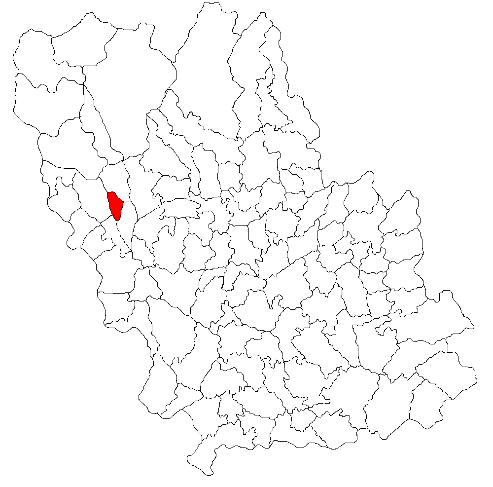 Categorie:Hărţi ale judeţului Prahova